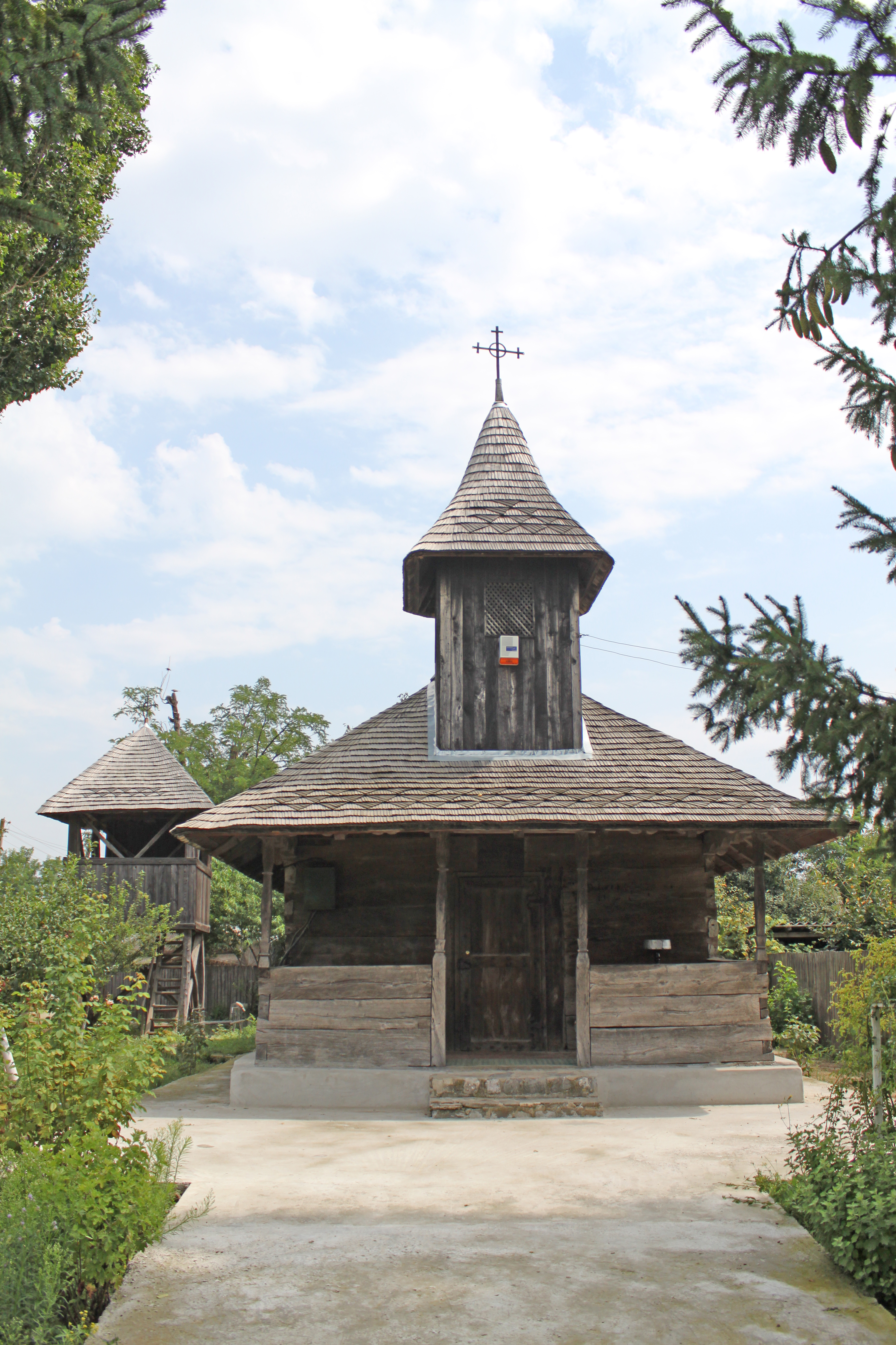 Biserica de lemn din Dridu-Snagov, judeţul Ialomiţa.